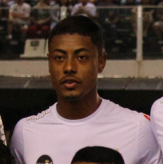 Fofo: Douglas Teixeira/Futebol Santista